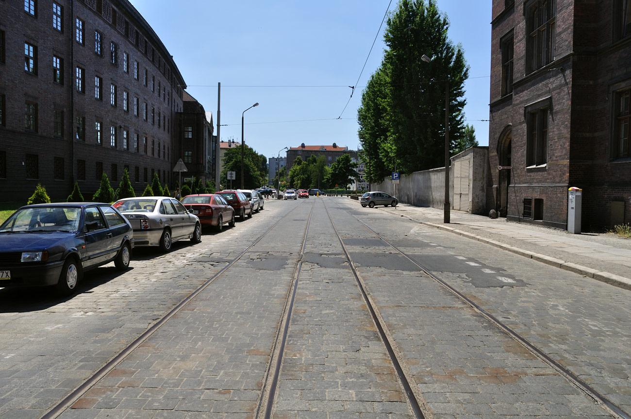 Trójkąt na ulicy Muzealnej - już żaden tramwaj tu nie wjedzie...